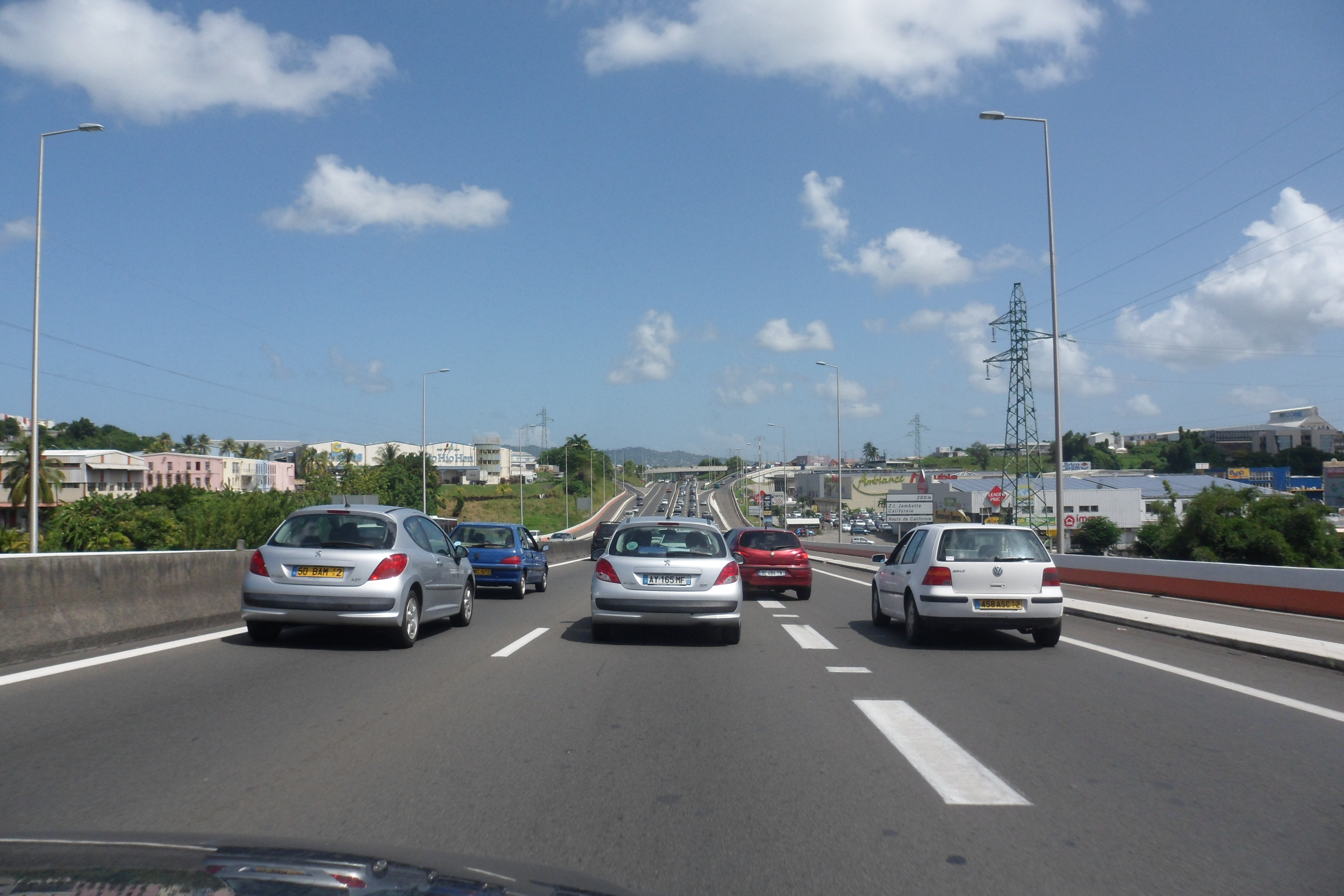 Embouteillages sur l'Autoroute A1 (972) un vendredi après-midi à Fort-de-France